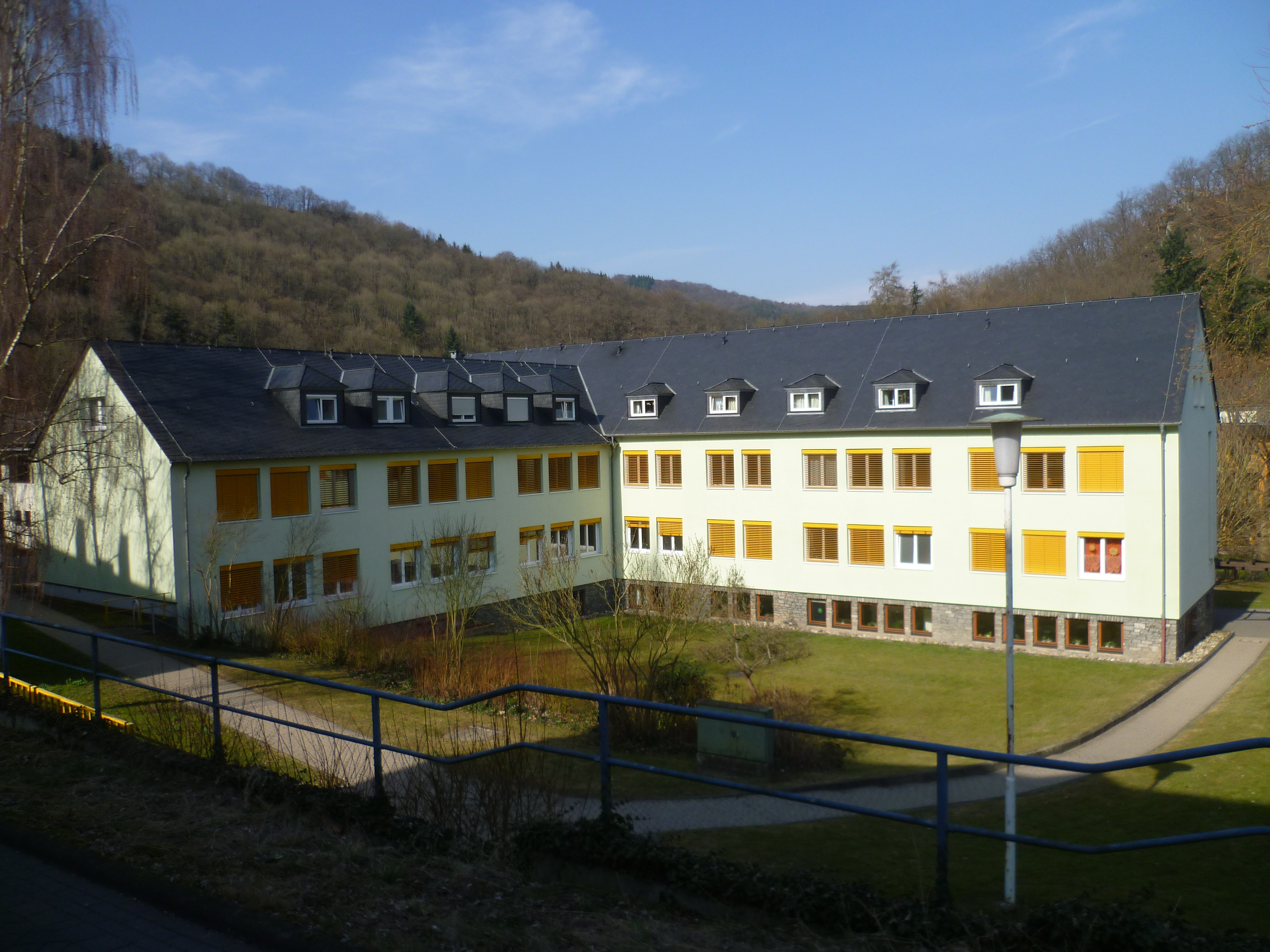 Das Wichernhaus der Heime Scheuern